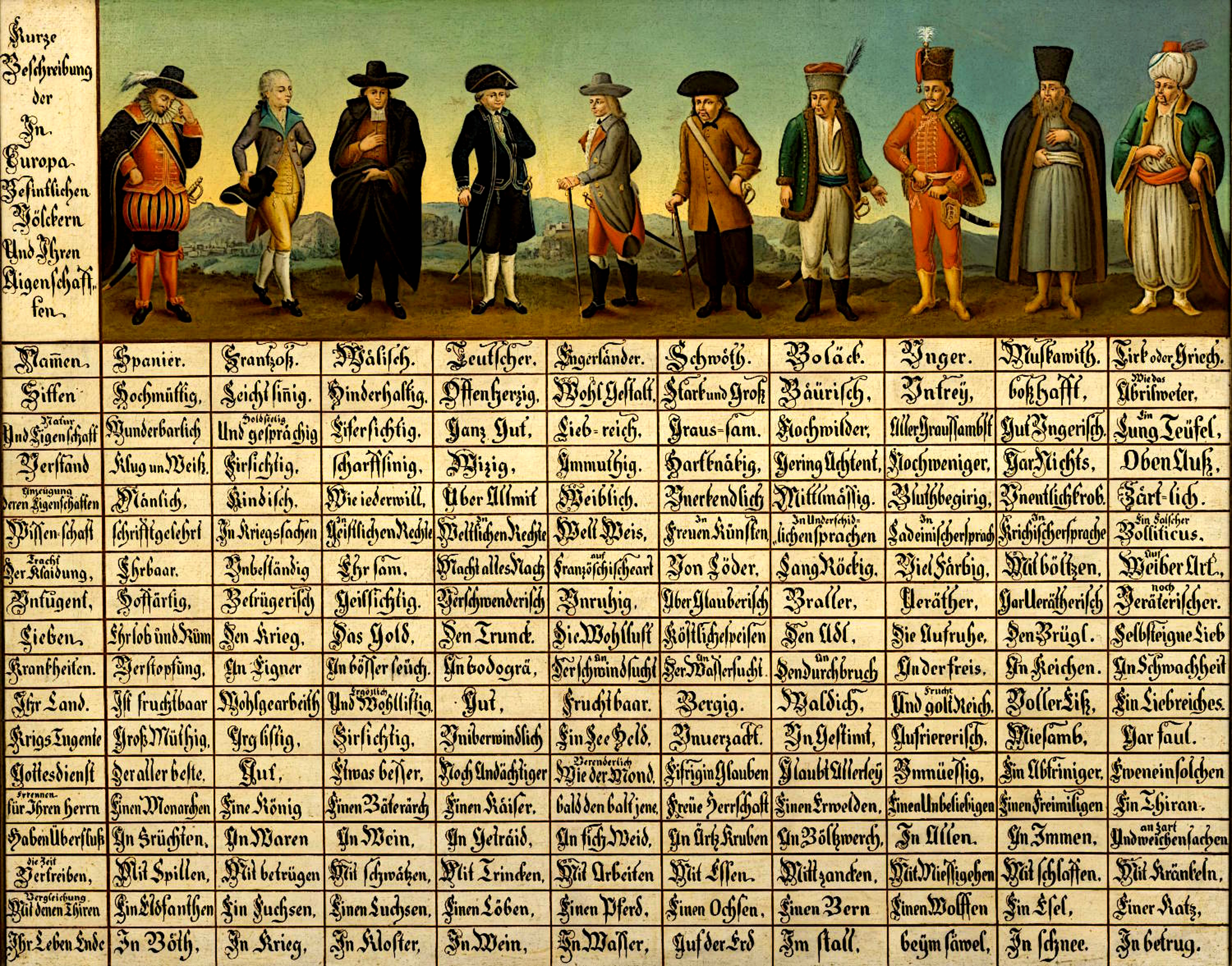 Die sogenannte "Völkertafel", auch bekannt unter dem Namen Kurze Beschreibung der in Europa befintlichen Völckern und Ihren Aigenschaften. Um 1725 in der Steiermark entstandenes Gemälde.